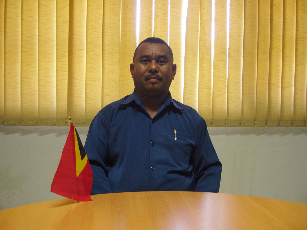 Bacelor C. Martins, Administrator des Subdistrikts Railaco